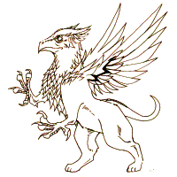 Griffin